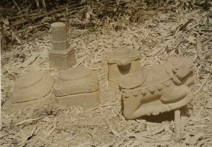 Foto. Deze foto is gemaakt tijdens de Commissiereis naar Centraal-Borneo van A.W. Nieuwenhuis. Hindoeïstische beelden bij de monding van de rivier Rata, Midden-Mahakam